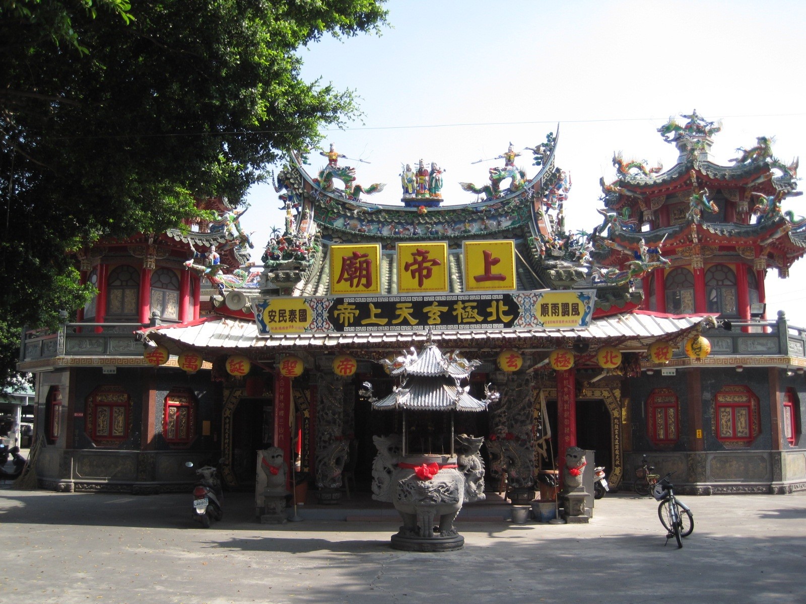 臺南市東區德高里的德高厝上帝廟